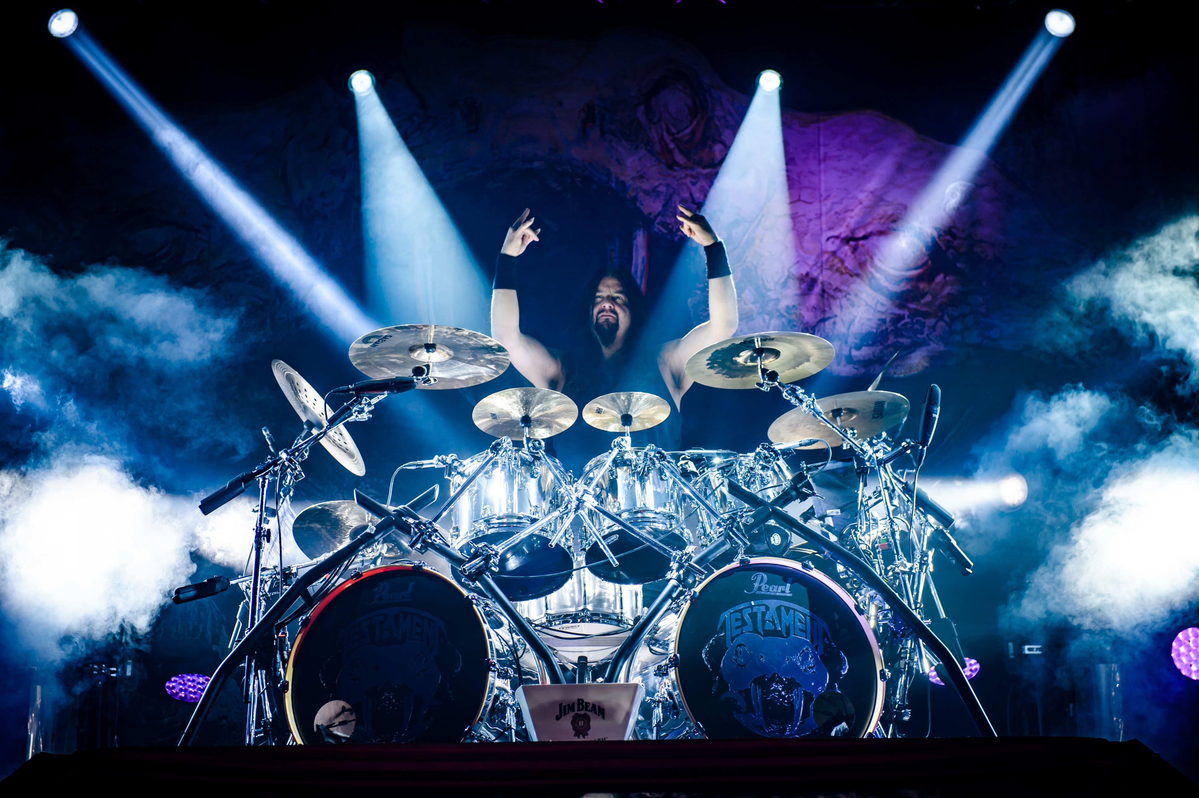 'Ruhrpott Metal Meeting 2017; Turbinenhalle Oberhausen': 'Testament'